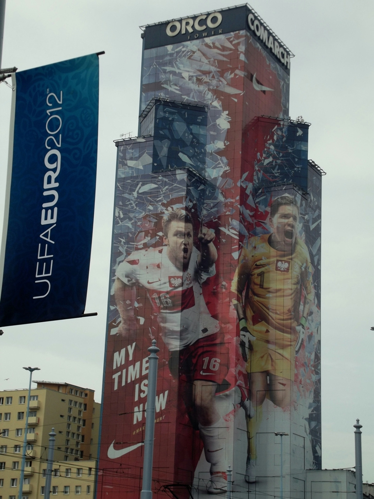 Zdjęcie zrobione w pierwszym dniu UEFA Euro 2012 w Warszawie, dniu otwarcia turnieju i meczu Polska-Grecja.